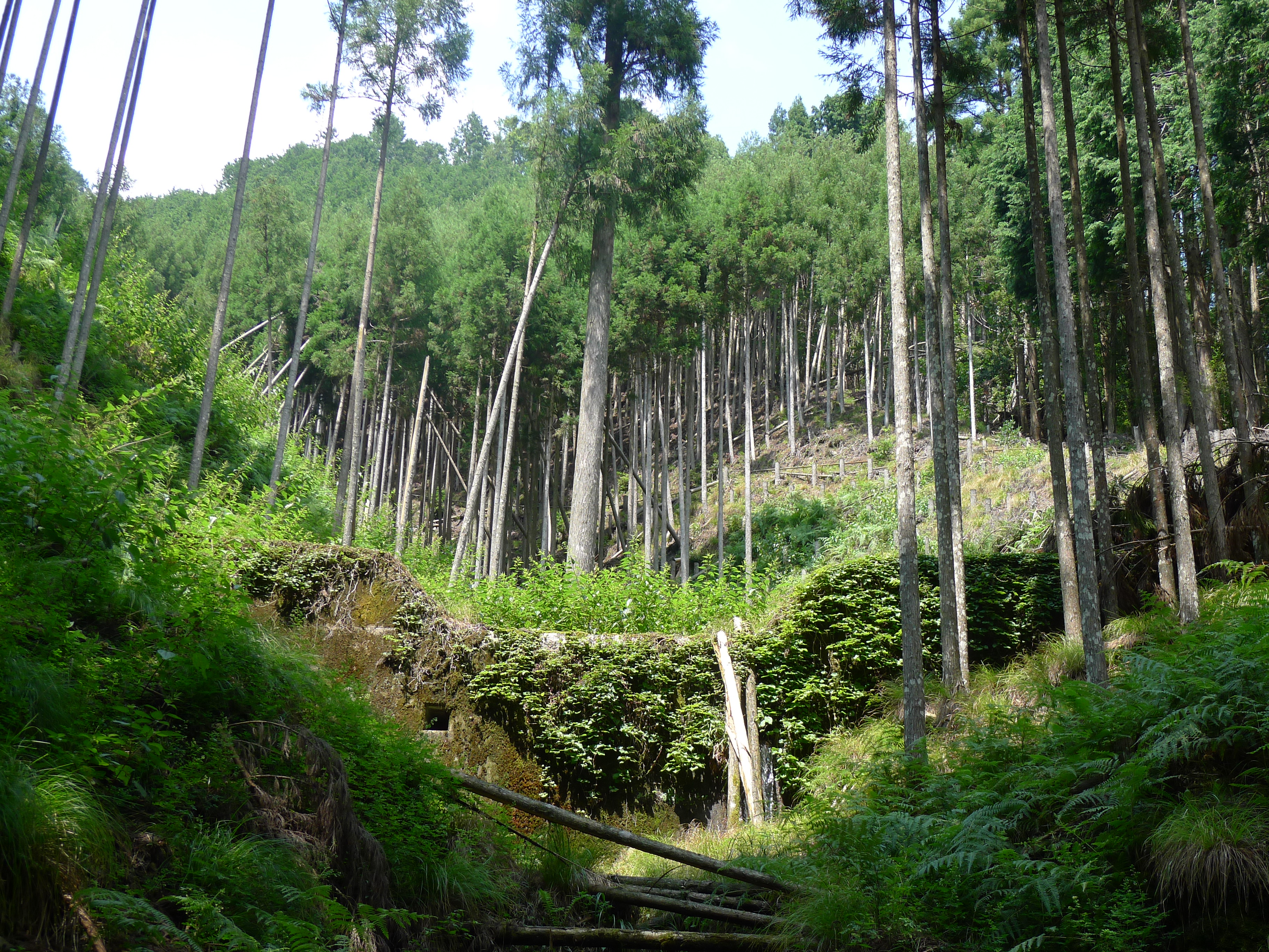 京都丹波高原国定公園内における北山杉営林地に設けられた治山ダム